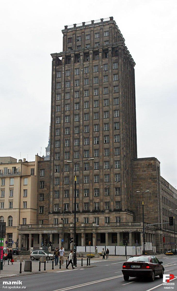 Dawny Prudential widziany z ulicy Świętokrzyskiej